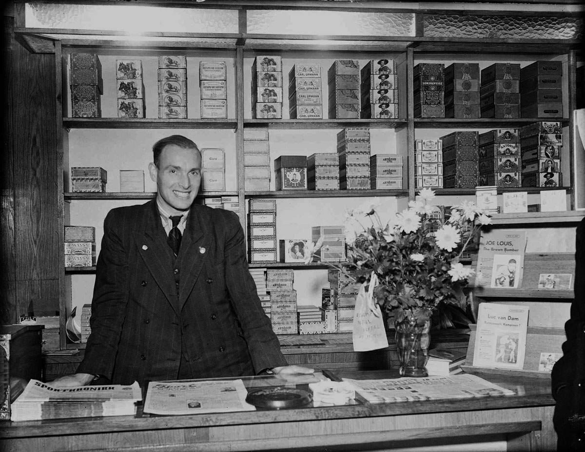 Voetballer Ko Bergman (FC Blauw-Wit) in zijn sigarenmagazijn 'Het Koggeschip' in de Zoutsteeg, 18 november 1946 Foto Ben van Meerendonk / AHF, collectie IISG, Amsterdam